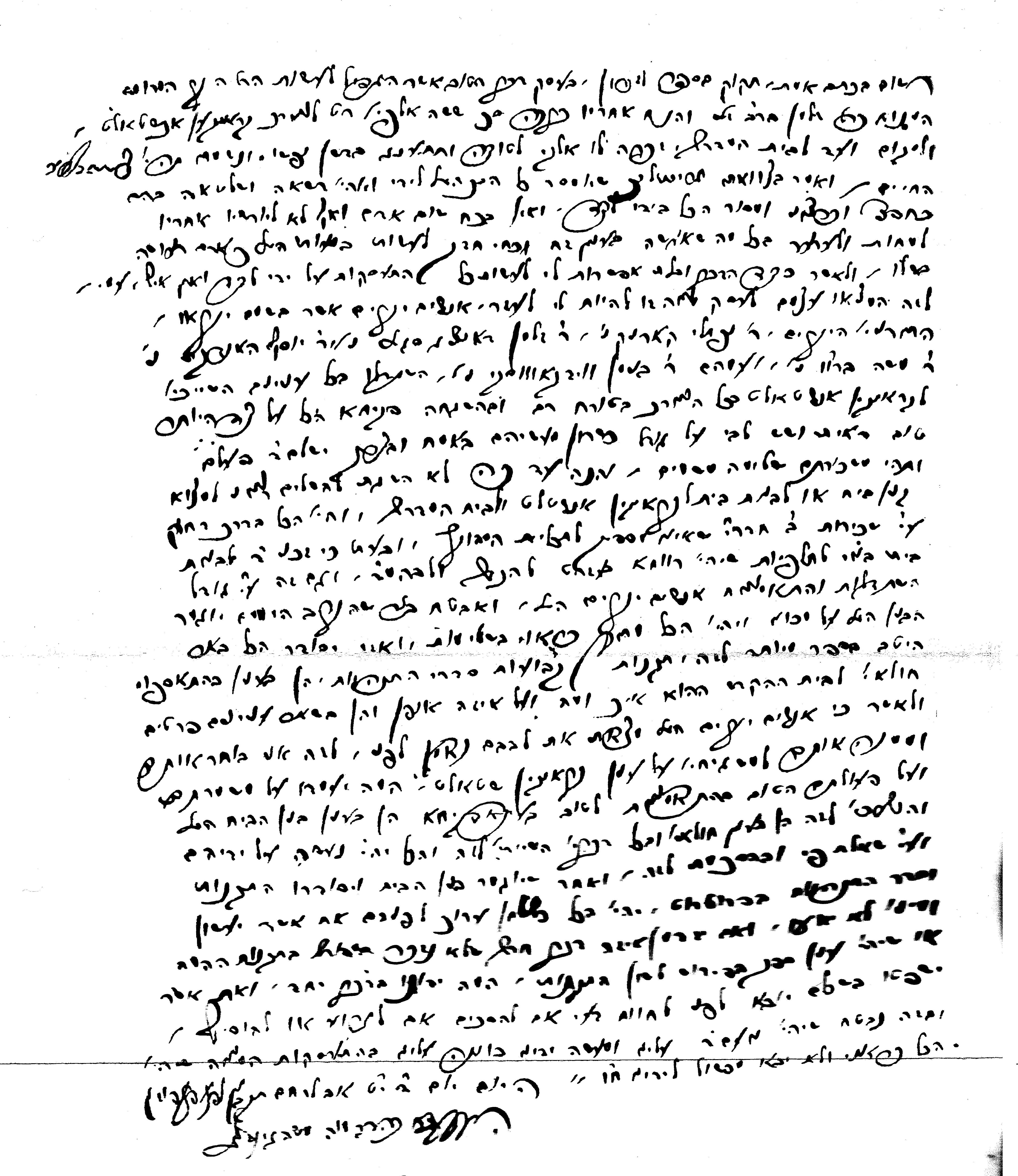 תצלום כתב ידו של רבי עקיבא איגר. כתב היד הודפס בספר אגרות סופרים בעמוד 94.